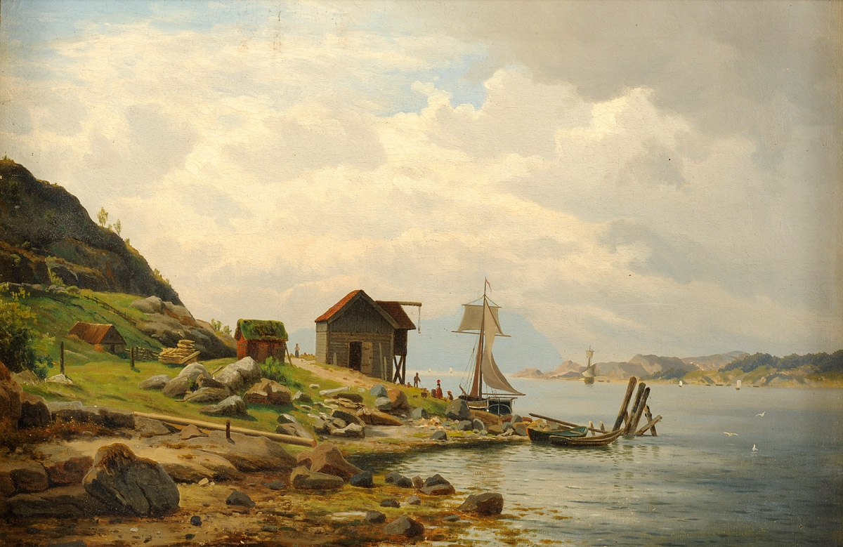 Schwedische Küstenlandschaft. Signiert. Öl auf Leinwand. 40 x 60 cm.